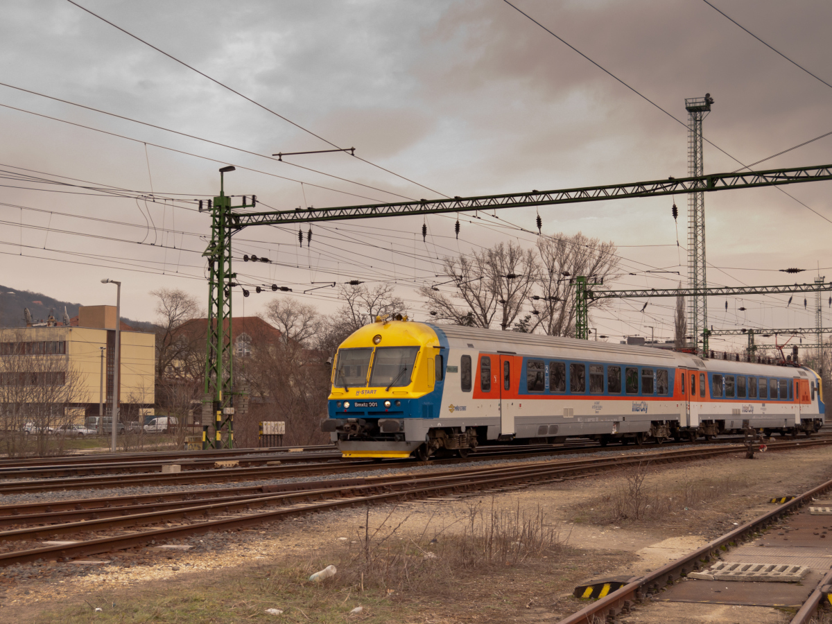 Közbülső kocsijaitól megfosztott BVmot 001, személyvonatként indul Tatabánya állomásról Oroszlány felé.